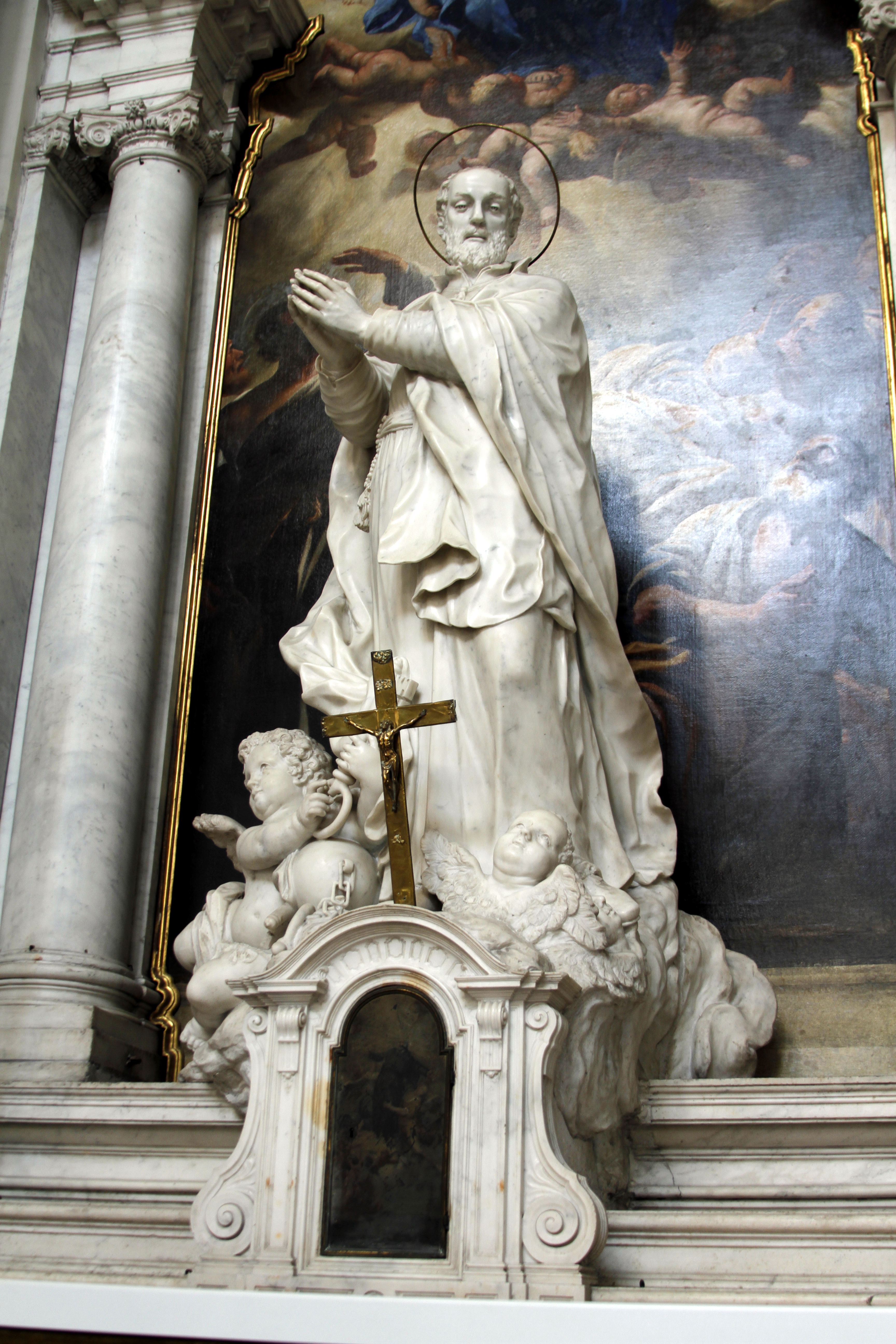 Santa Maria della Salute, Venice